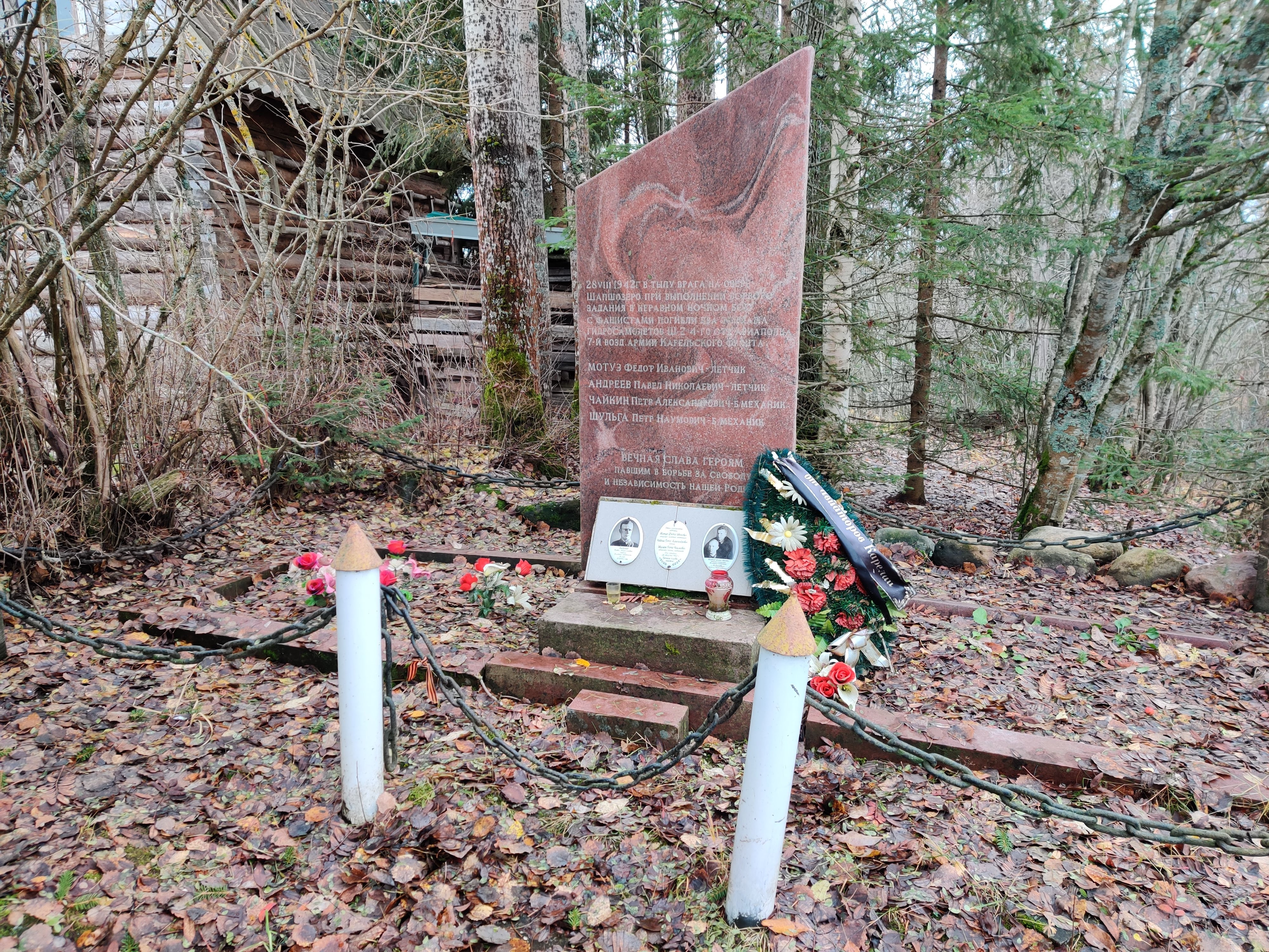 Памятник погибшим 28.08.1942 летчикам